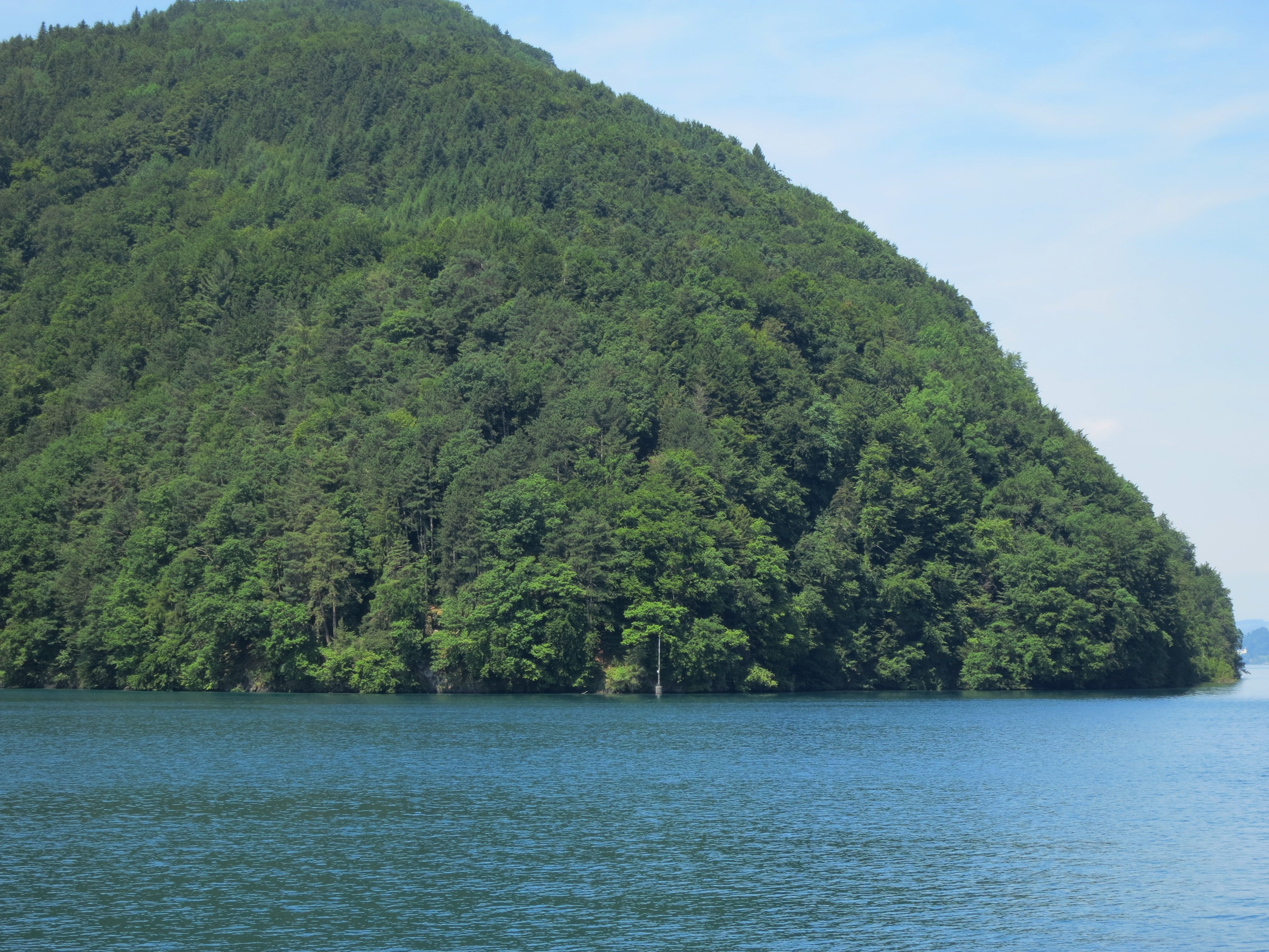 Untere Nas, Bürgenstock LU, Schweiz : Das A2226 Artilleriewerk Untere Nas bildete das Gegenwerk zu A2215 Artilleriewerk Obere Nas.